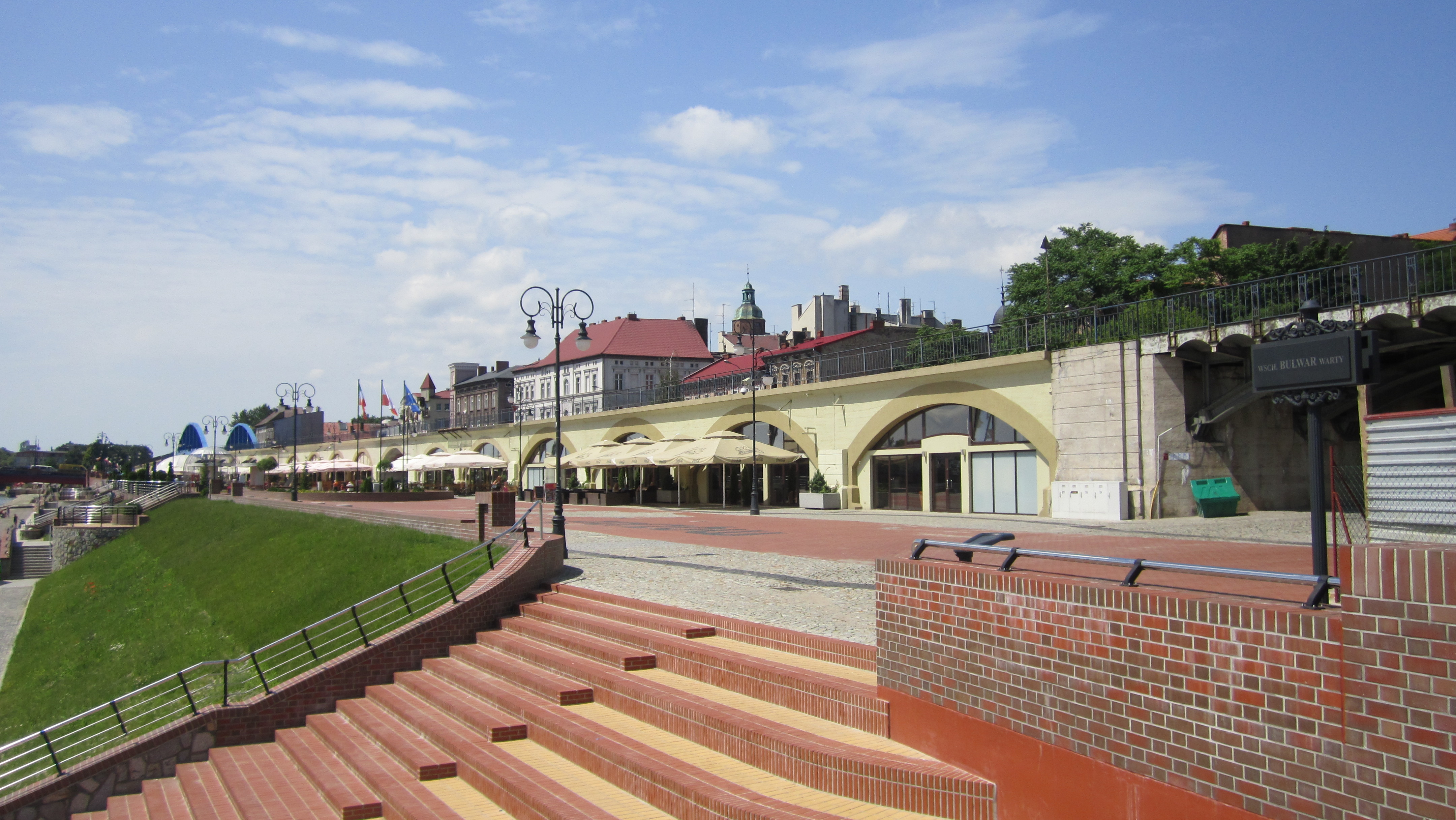 Bulwar wschodni z zabytkową estakadą w Gorzowie